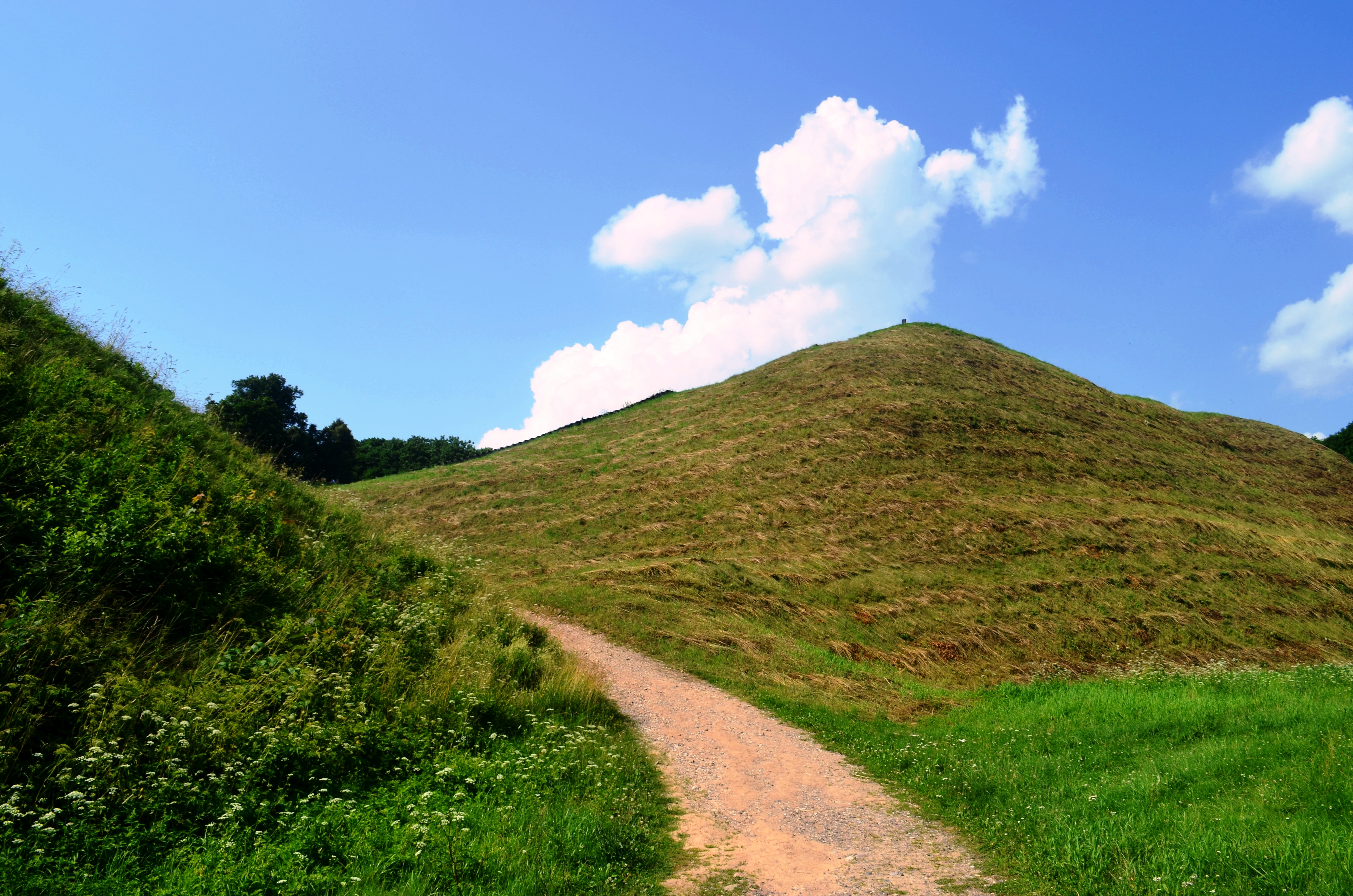 Kernavės piliakalniai, Širvintų raj.